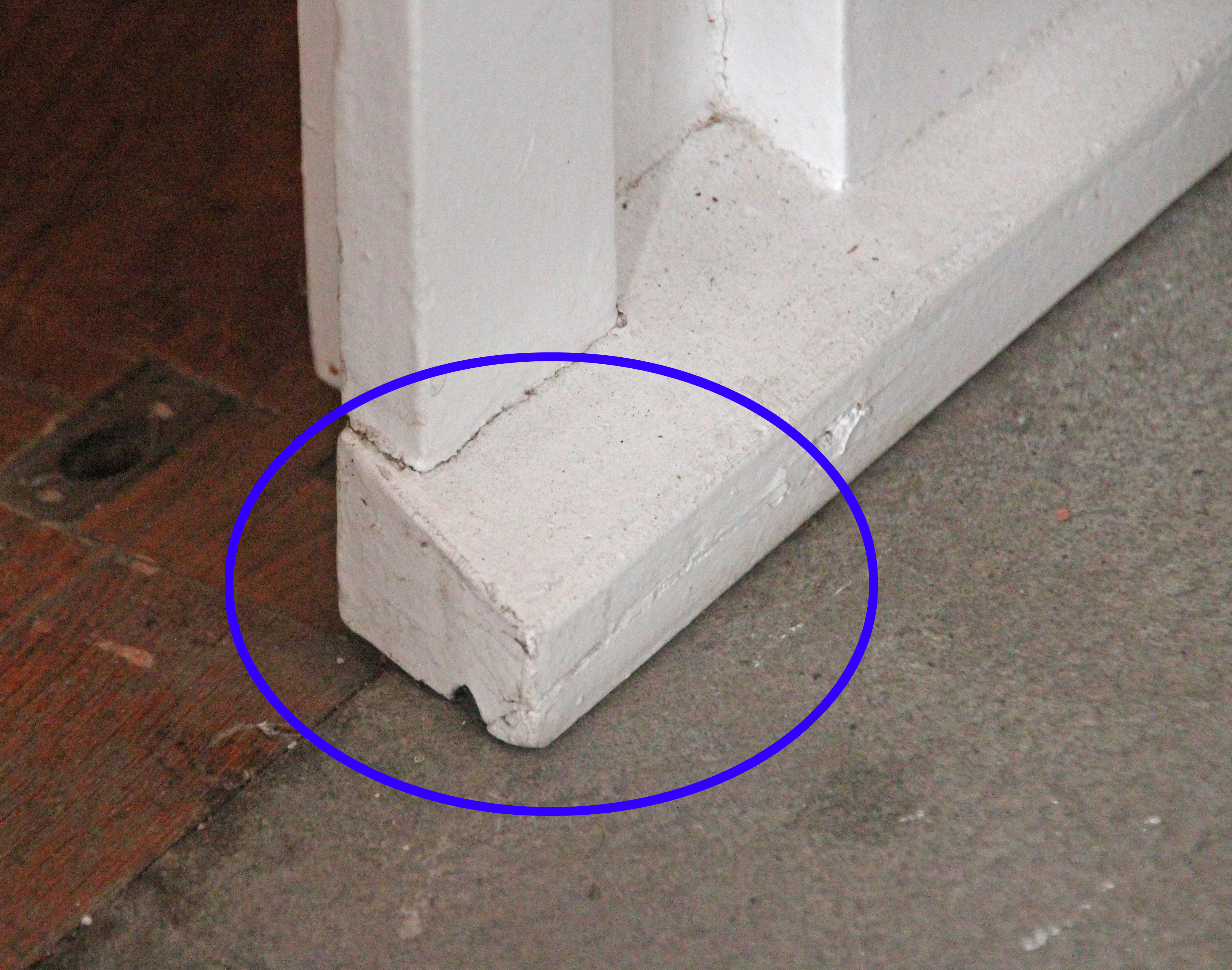 Bildinhalt: Wetterschenkel (mit Tropfnase) an einer weißen Balkontür. Hervorhebung durch einen blauen Kringel. Aufnahmeort: Worms, Deutschland